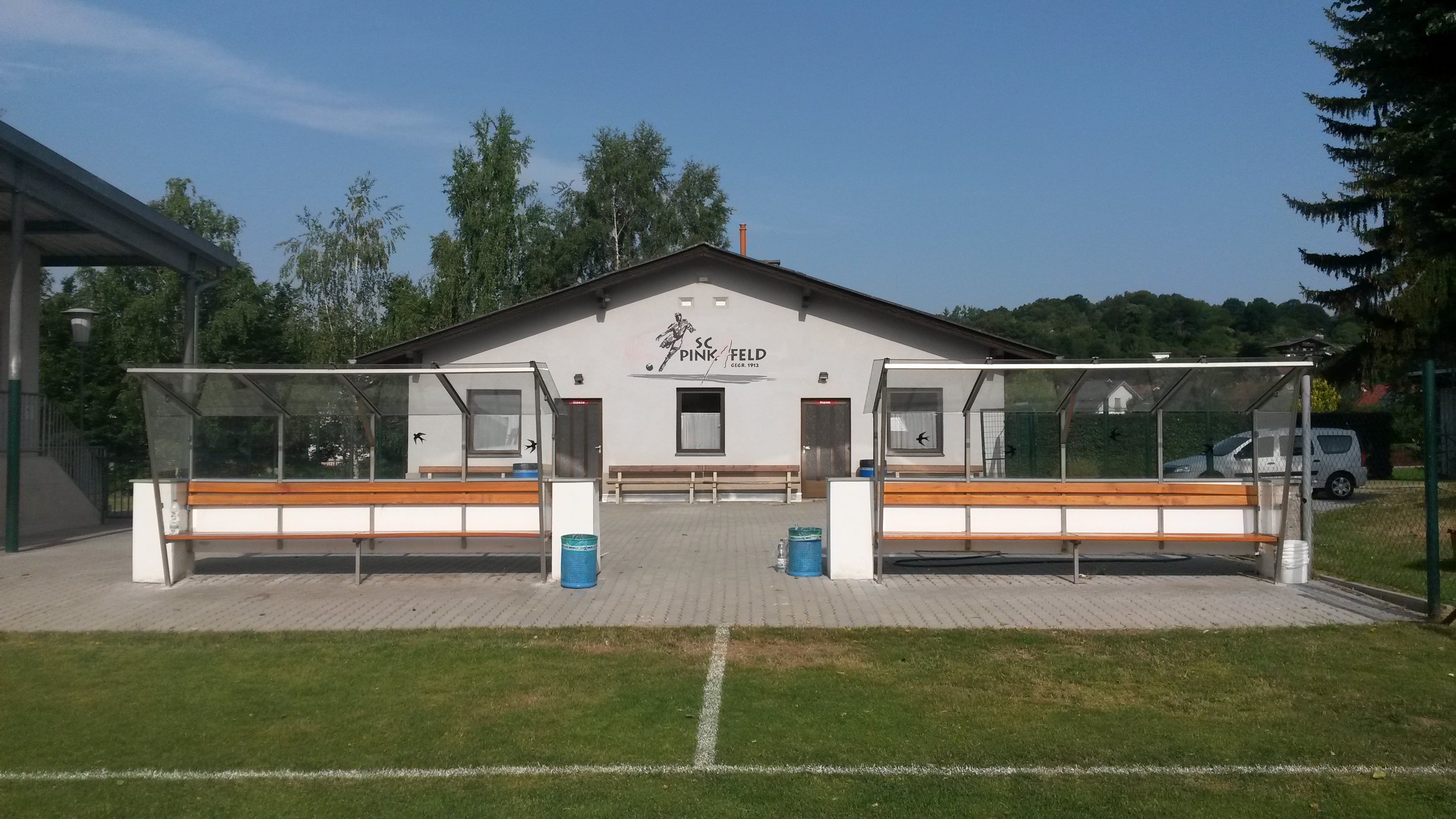 Alte Umkleidekabine